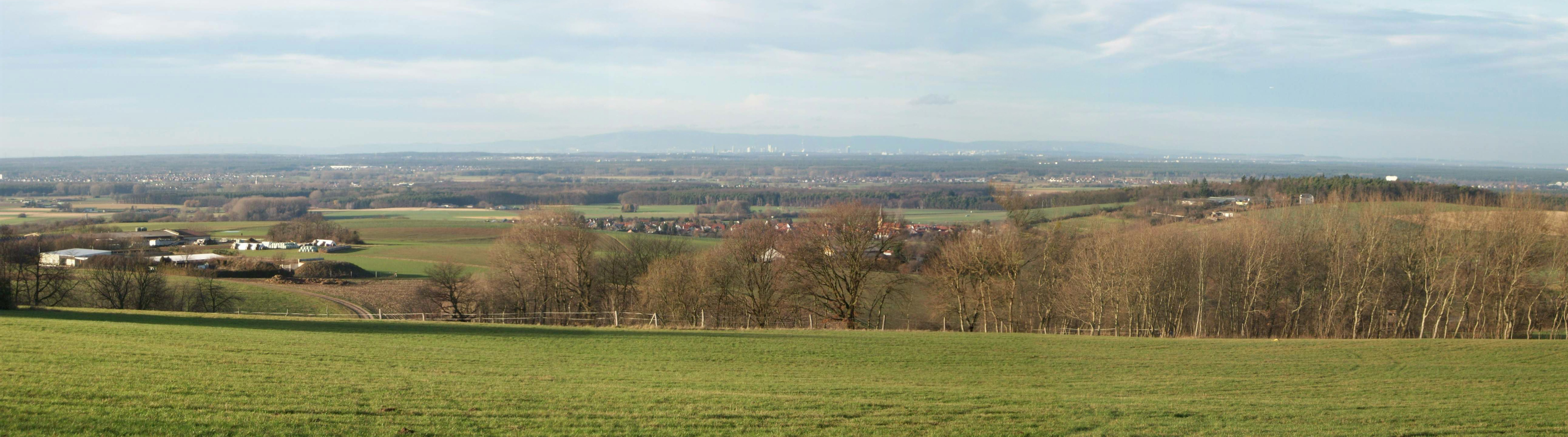 Blick vom Standort Binselberg Klein-Umstadt, den letzten Ausläufern des nördlichen Odenwaldes (Naturraum Kleine Bergstraße (231.3) nach Norden und Westen in die Dieburger Bucht (Naturraum 232.230), Teil der Untermainebene (Rhein-Main-Tiefland). Am Horizont Frankfurt am Main und der Taunus